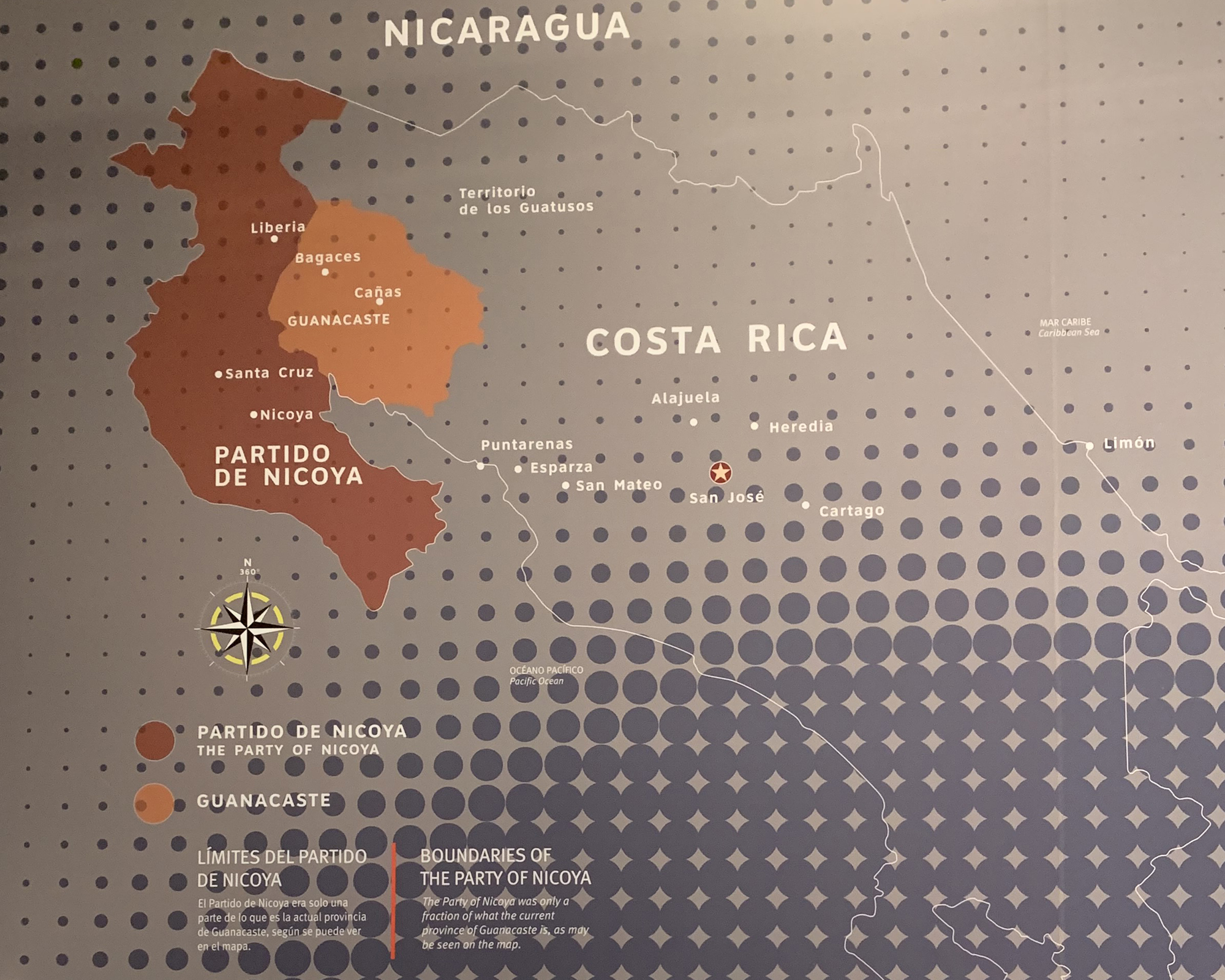 Mapa mostrando los límites del Partido de Nicoya y y de la entonces provincia de Guanacaste de Costa Rica antes de la anexión de Nicoya. Museo Nacional de Costa Rica, San José